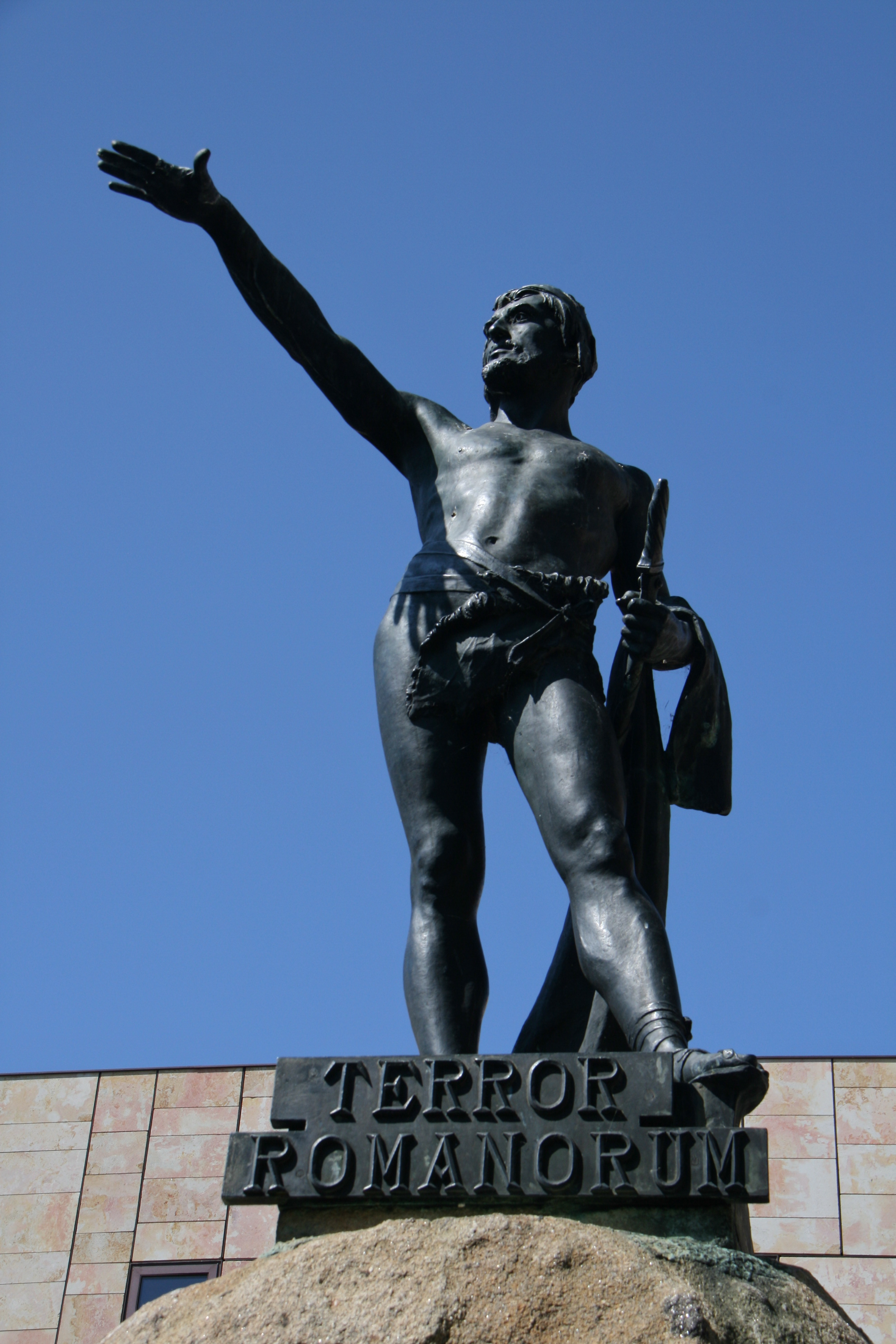 Estatua de Viriato - Plaza de Viriato - Zamora